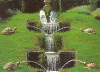 Tortoise cascade